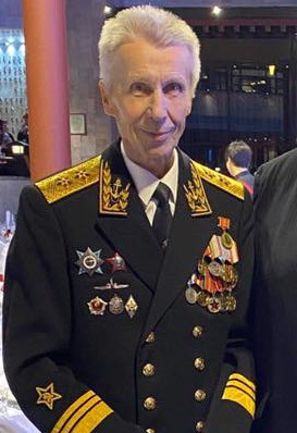 Бывший командир Каспийского Высшего Военно-морского училища имени С.М. Кирова города Баку, вице-адмирал Леонид Иванович Жданов во время празднования 80-ого летия осования училища в Санкт-Петербурге.